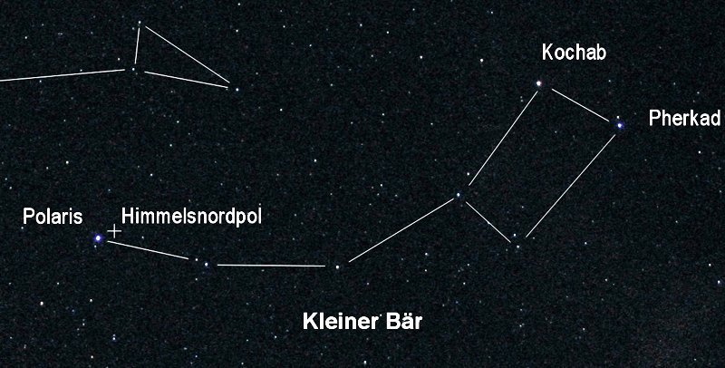 Sternbild Kleiner Wagen, fotografiert am 16.03.2004 mit 35mm Weitwinkel, 15 Sekunden, Blende 2,0, Canon G5